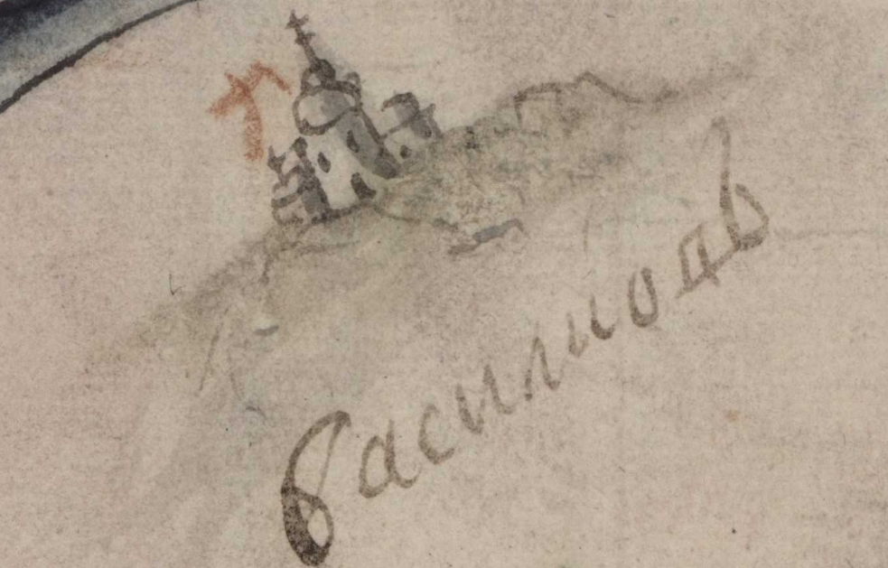 Фрагмент карти Київської губернії. XVIII століття. РГАДА, ф. 192, оп. 1, Киевская губ., № 5.